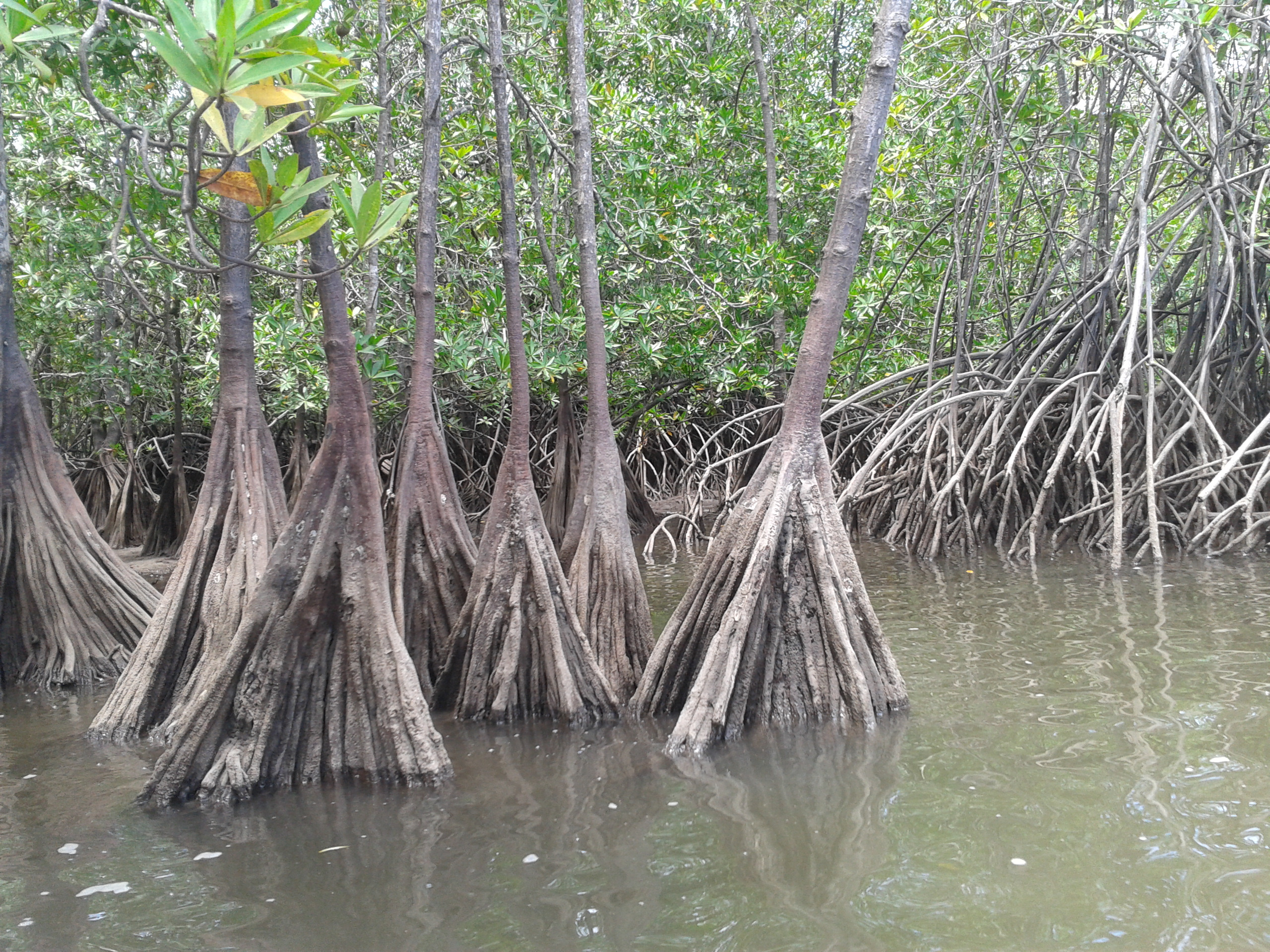 Pelliciera rhizophorae, Humedal Térraba-Sierpe, Costa Rica